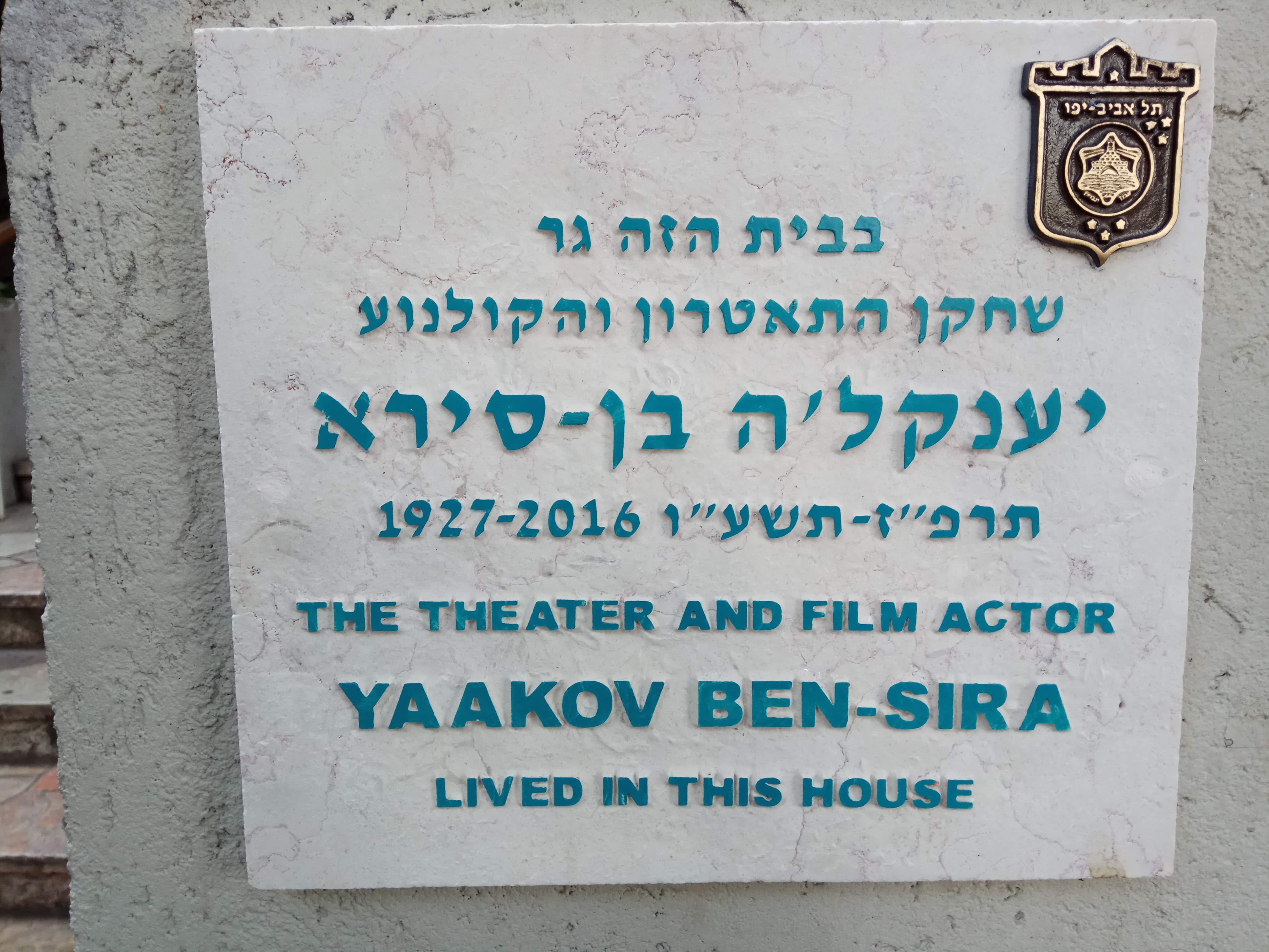 לוחית זיכרון בכניסה לביתו של השחקן יעקב בן סירא ברח' הנביאים 4 בתל אביב